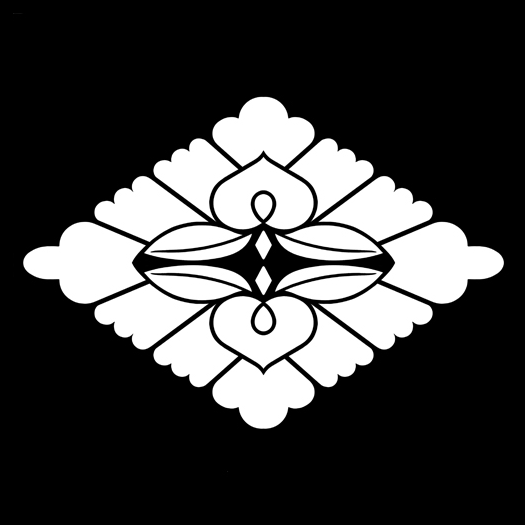 「向い藤菱」紋（染抜）